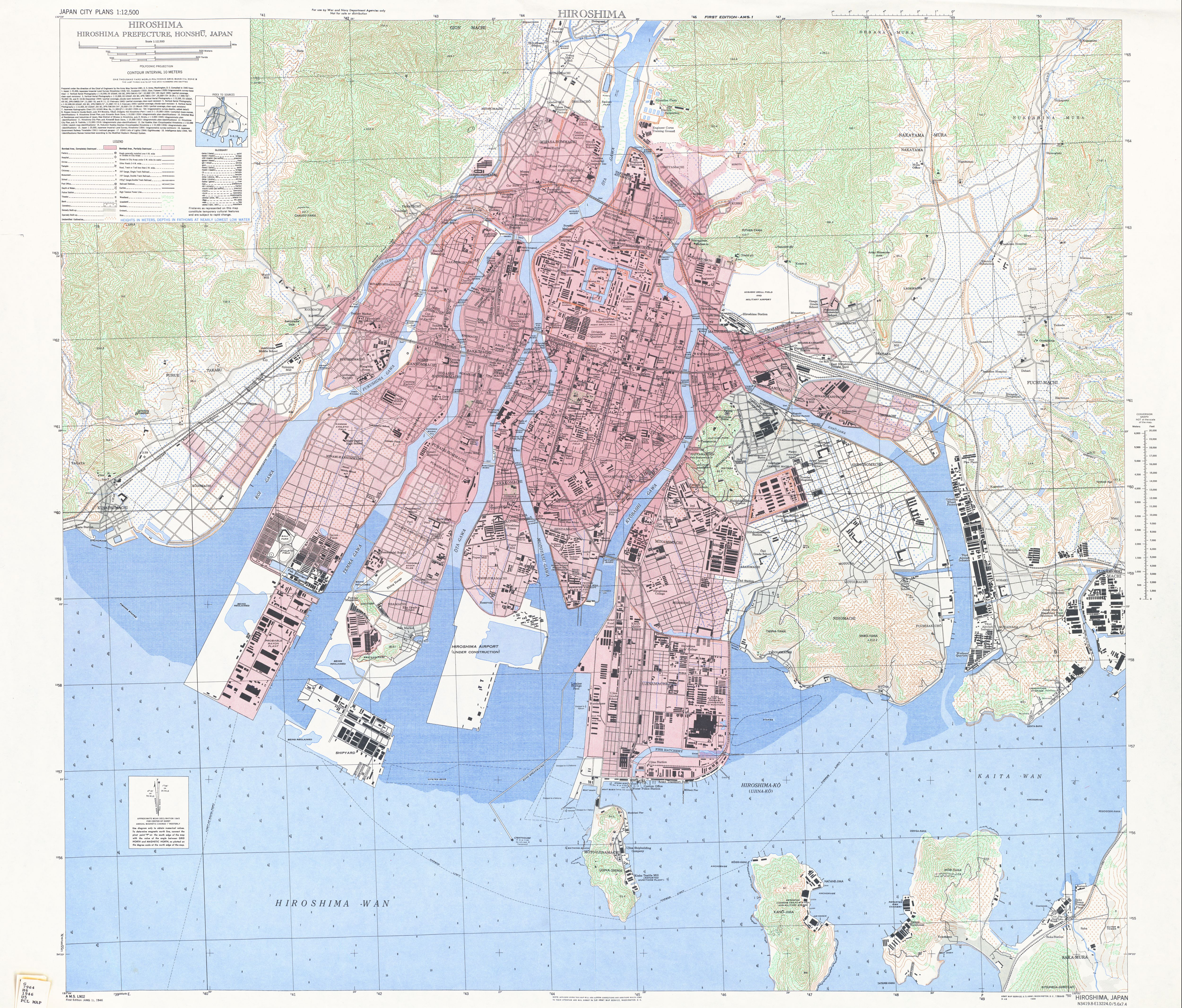 1945年アメリカ軍作成の旧広島市の地図。1930年代の大日本帝国陸軍の陸地測量部他の各種刊行物と1945年の米軍による航空写真をもとに米国陸軍が作成した地図で原爆による被災状況が記載されている。赤い斜線（濃い赤）の地域が全壊地域、赤い点（薄い赤）の地域が半壊地域である。地図の升目は1000ヤード（914.4メートル）である。